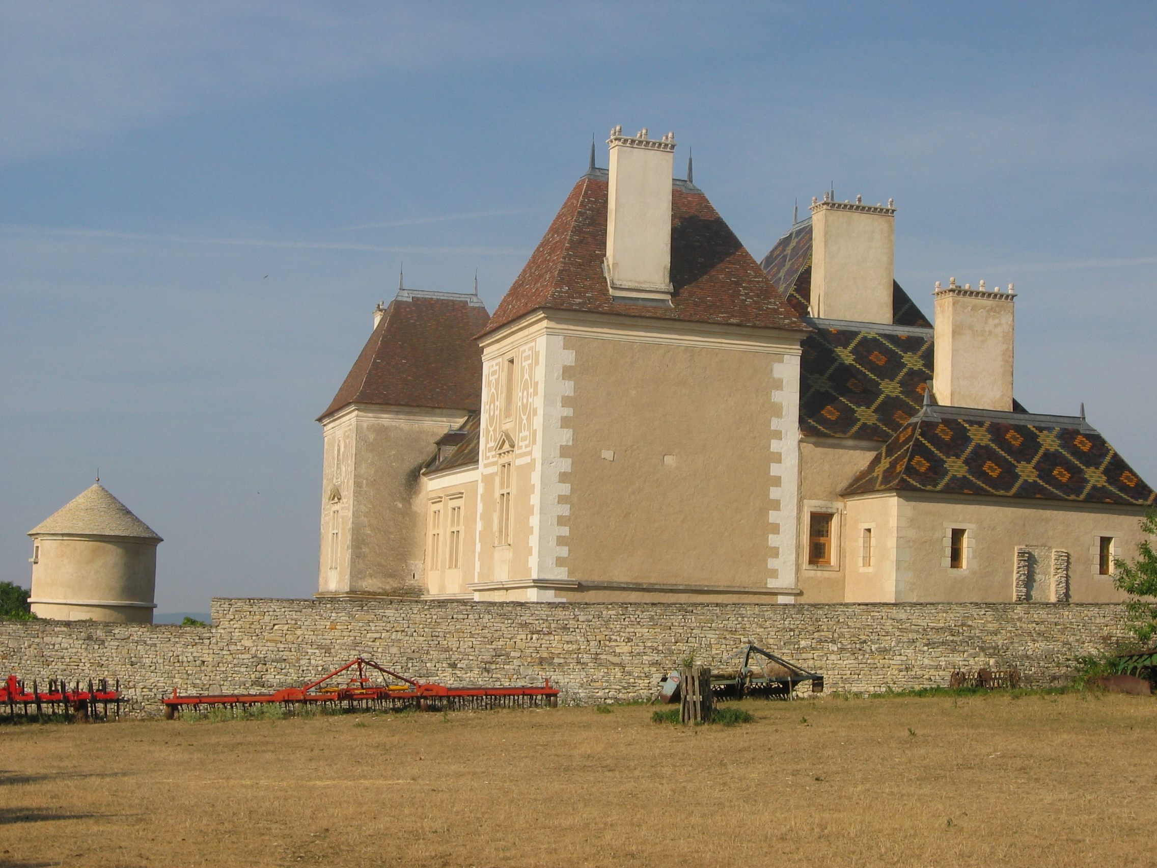 Photo prise depuis Jouancy dans l'Yonne, Bourgogne